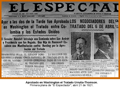 Página del periódico El Espectador de 1921.